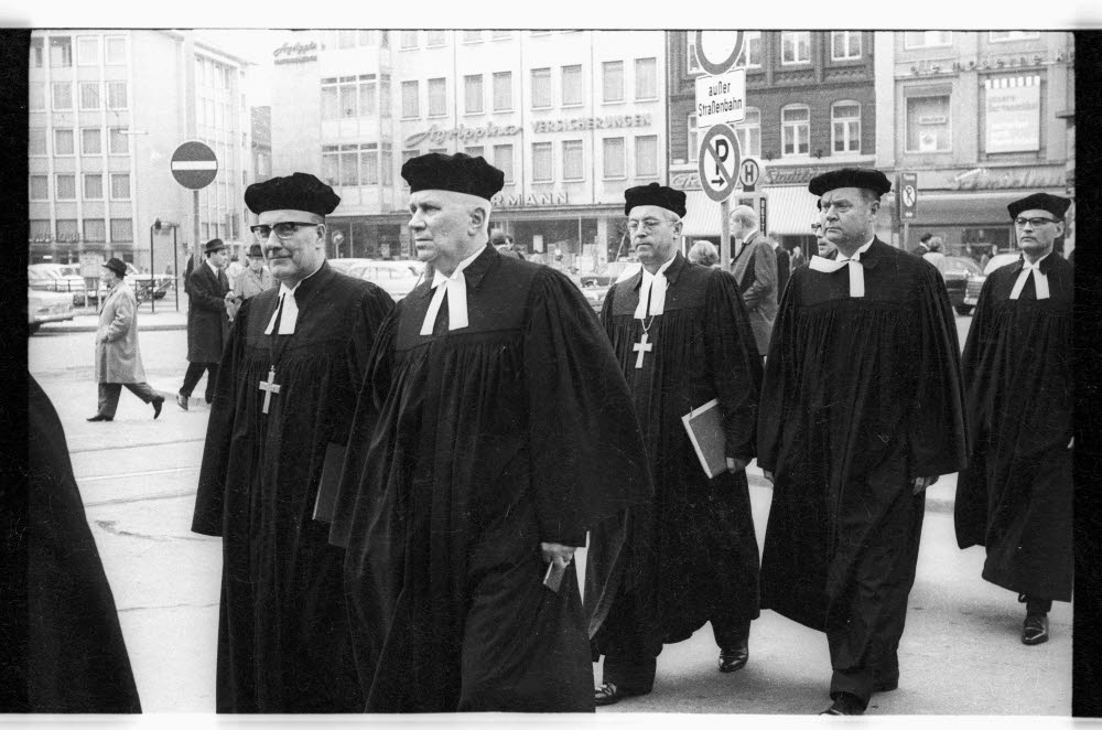 Im Bild v.l.n.r.: Amtsvorgänger Propst Kurt Sontag, stellvertretender Propst Hans Martensen, Bischof von Holstein Friedrich Hübner und neuer Propst Berthold Kraft vor der Nikolaikirche auf dem Alten Markt.